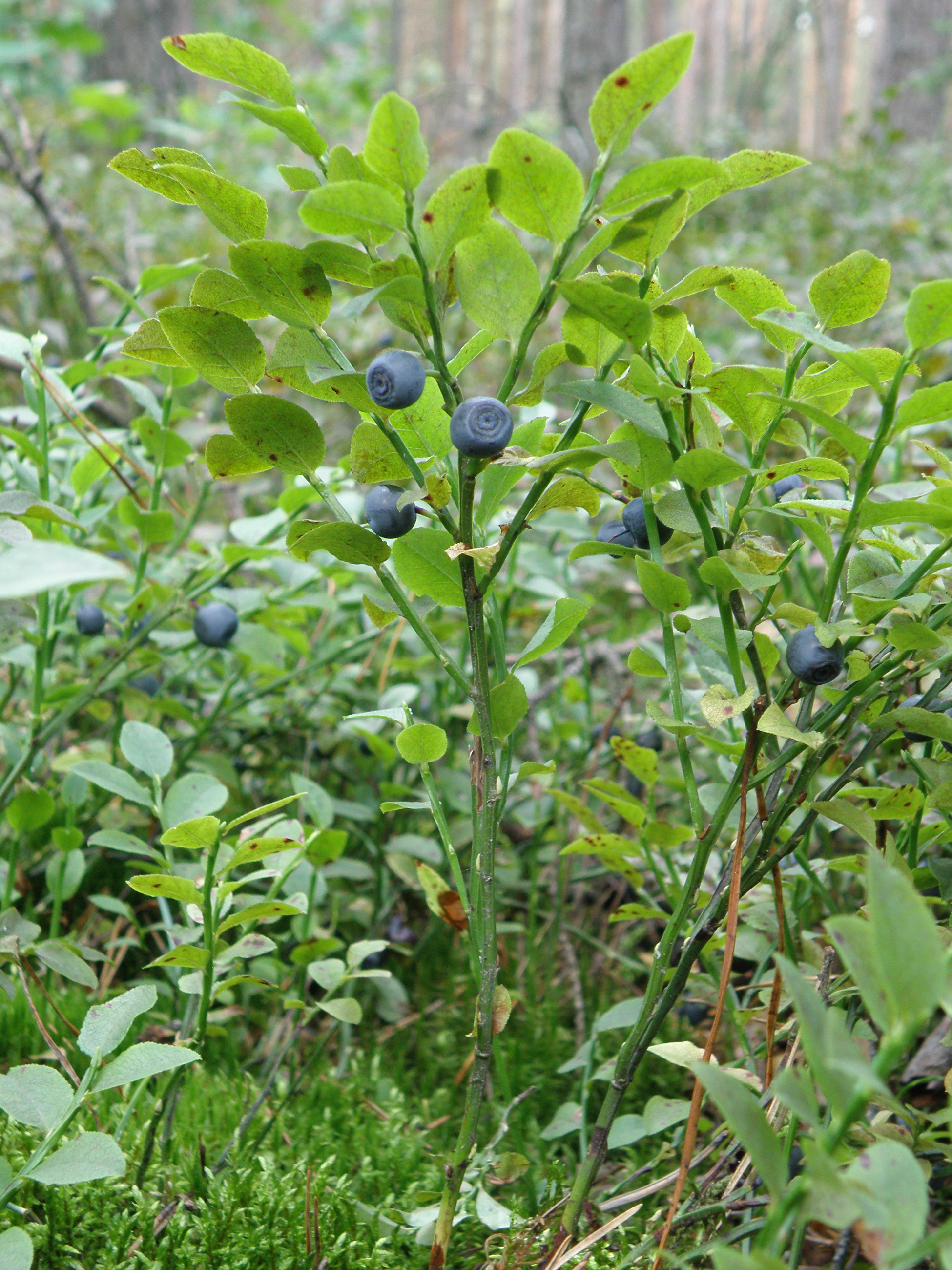 Borówka czarna, czarna jagoda (Vaccinium myrtillus L.)